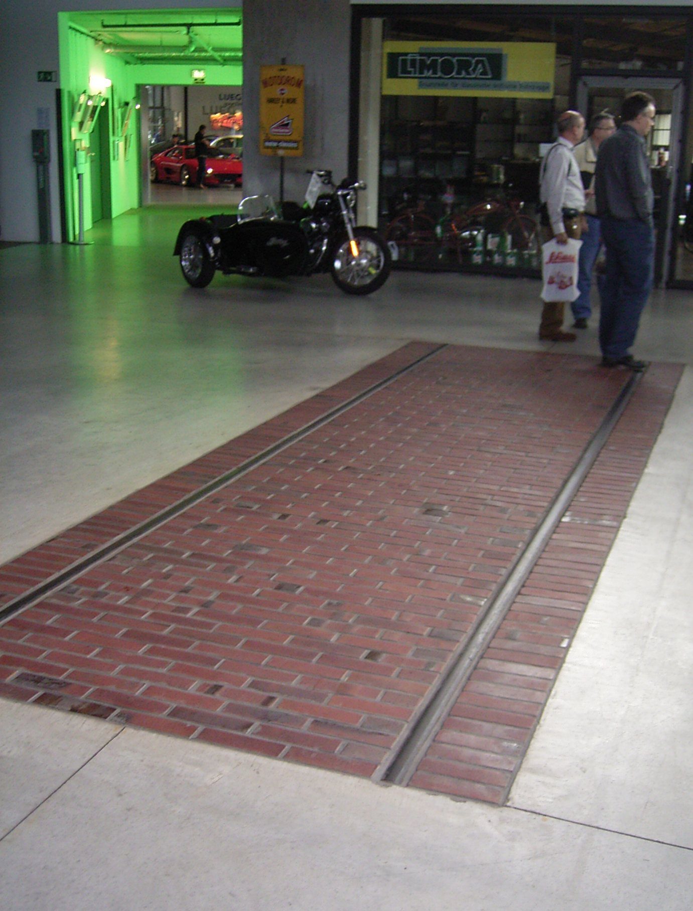 Meilenwerk Düsseldorf erhaltenes Gleissegment in der Halle